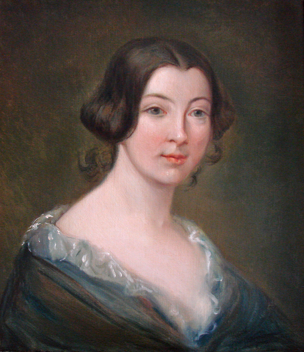 Portrait de Clotilde de Vaux exposé dans le salon de l'appartement d'Auguste Comte (philosophe, 1798- 1857), 10 rue Monsieur le Prince à Paris. Dans le salon, à droite au mur, le portrait de Clotilde de Vaux fait par le peintre Etex au-dessus du fauteuil sur lequel elle s'asseyait lors de ses visites à Auguste Comte. La rencontre avec elle eu lieu en 1845, elle meurt un an plus tard (rue Payenne, sa maison a été transformée en Chapelle positiviste). C'est sous son influence et en son souvenir qu'Auguste Comte a imaginé une religion dont le culte est l'Humanité elle-même.